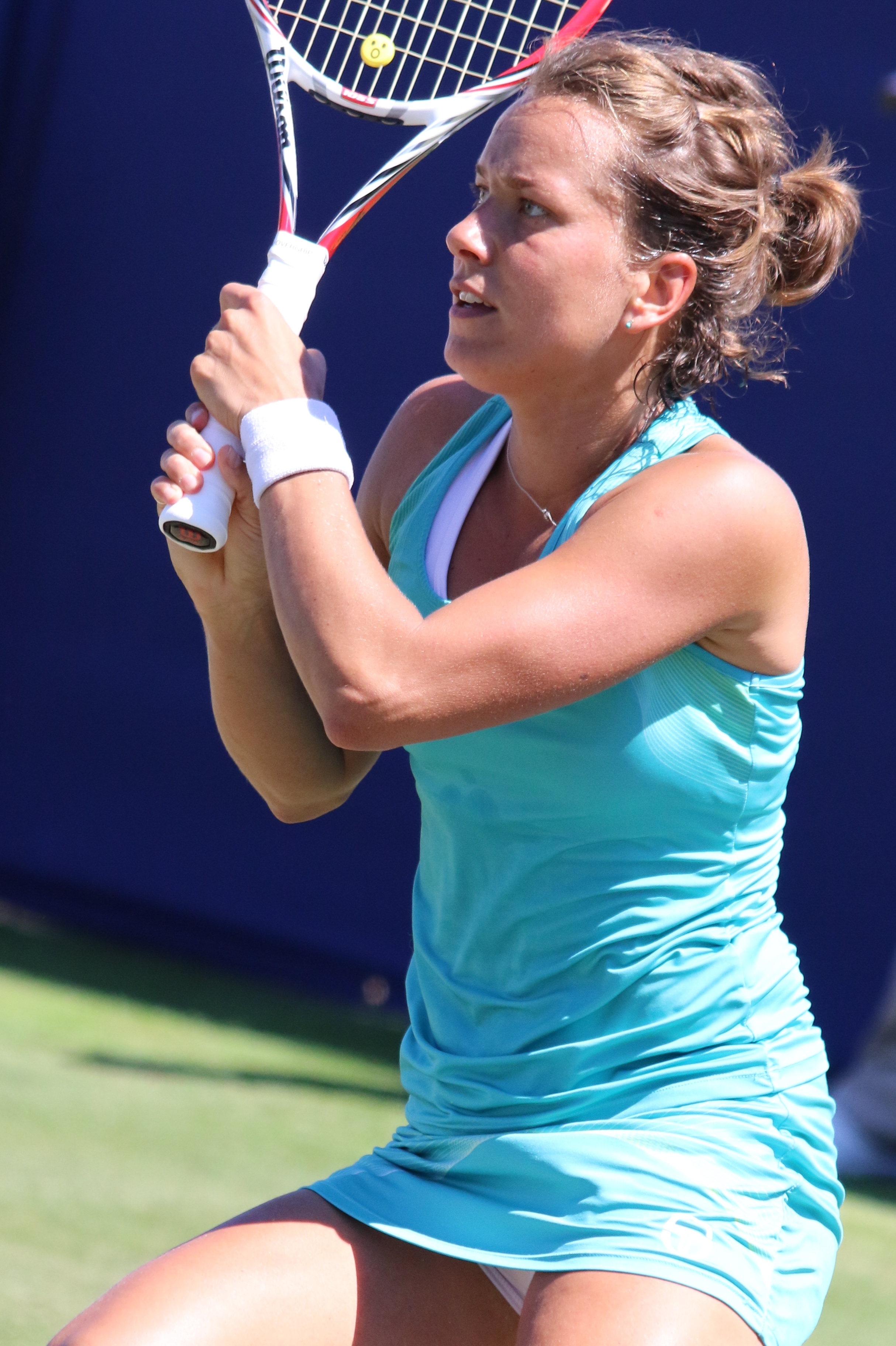 Strycova EBN17 (34)